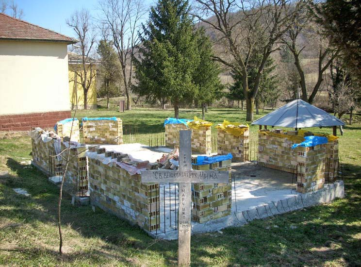 Православният храм "Св. Мина" на село Марчино, община Попово в строеж - пролетта на 2010 г.